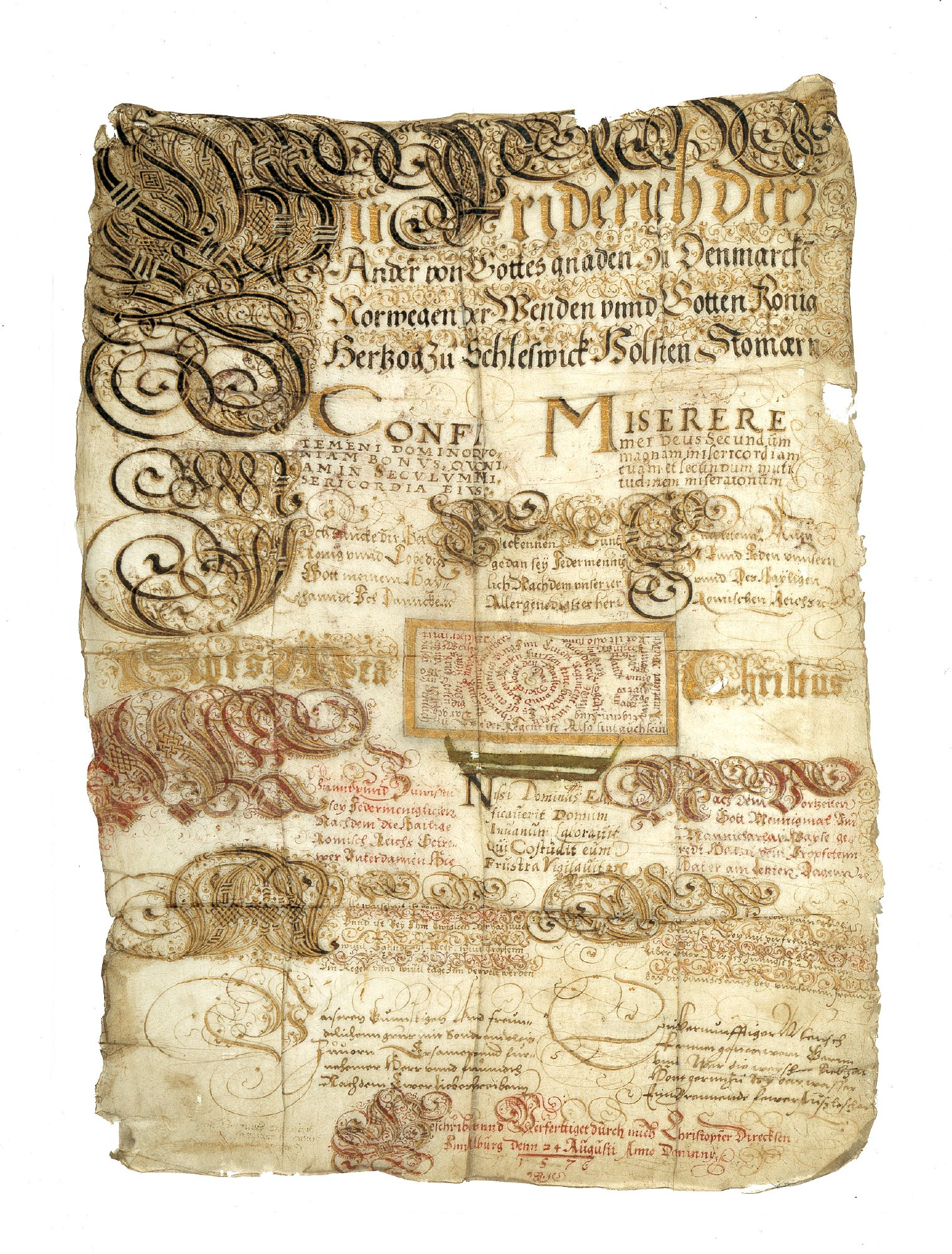 Børn, der blev født med en del af fosterhinden på sig i form af en dækkende sejrsskjorte eller en sejrskalot, blev af traditionen spået et langt og lykkeligt liv. En sådan sejrsskjorte er blevet tørret som pergament og forsynet med en lang indskrift på latin og tysk. Forneden står med rød og gylden skrift: "Geschriben und Verferttiget durch mich (skrevet og forfærdiget af mig) Christopfer Direcksen zu Alburg. Denn 24. Augusti Anno Dominny 1576".